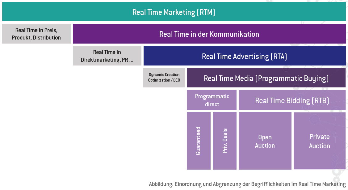 Abgrenzung von Real Time Advertising und Real Time Bidding innerhalb des Real Time Marketings. Quelle: Resolution Media, Real Time Marketing Kompass 2018, S. 57